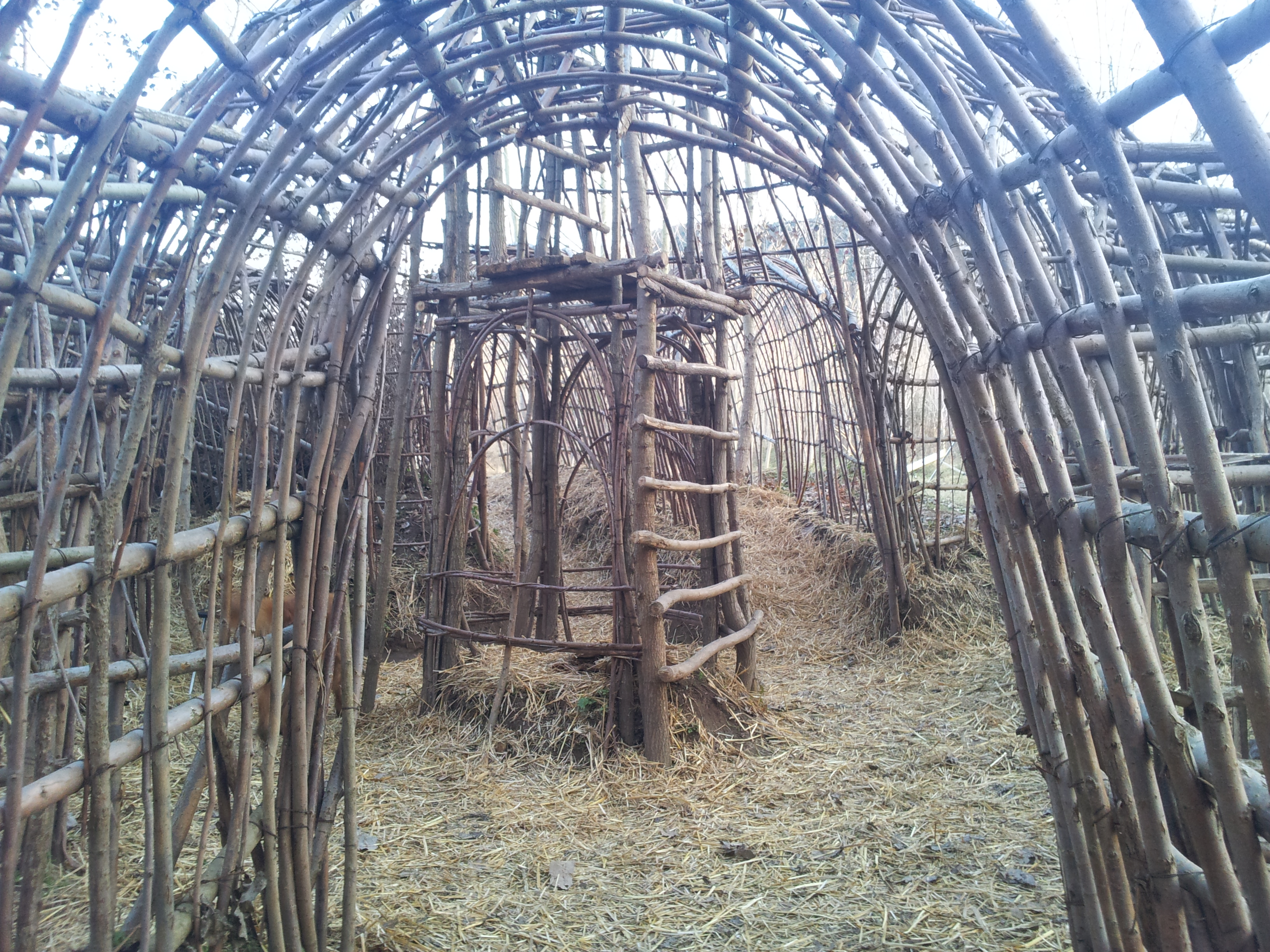 Actual laberint de les Cabanes d'Argelaguer